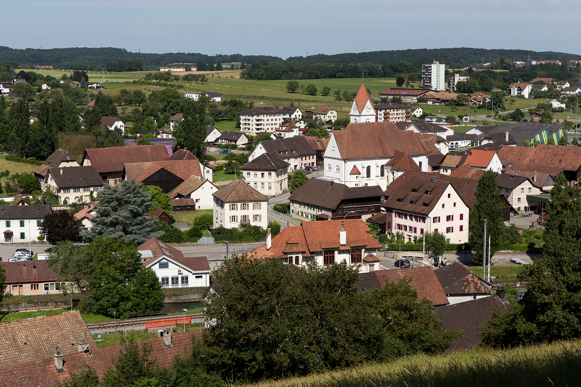 Dorfmitte von Boncourt (JU)